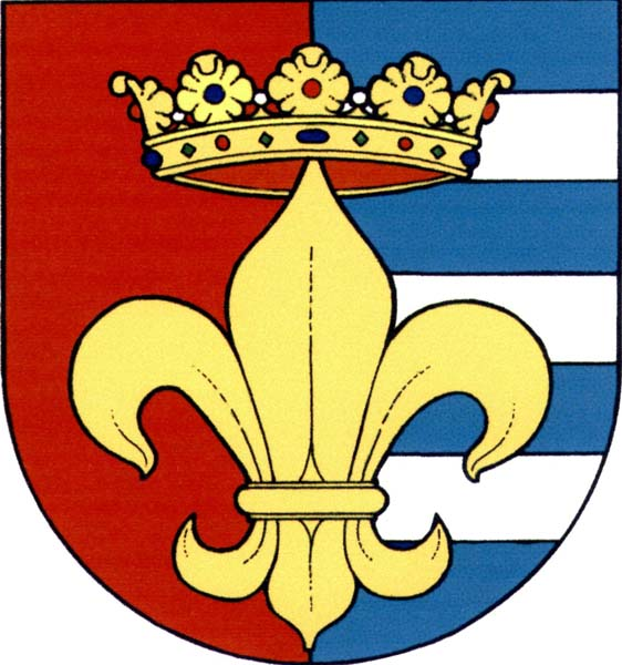 Znak obce Krásný Dvůr